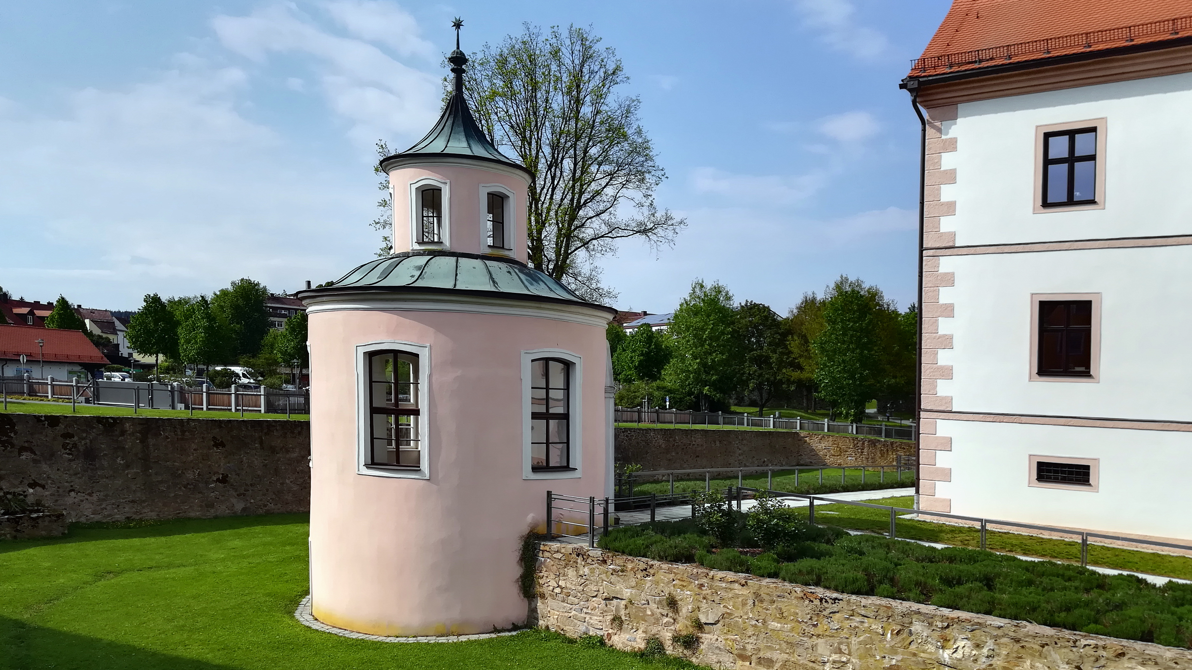 Das Abteischloss Waldsassen liegt in der Oberpfälzer Stadt Waldsassen im Landkreis Tirschenreuth und ist ein Teil des Klosters Waldsassen.